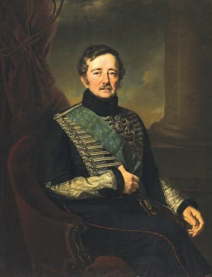 Иван Фёдорович Паскевич (1782-1856)